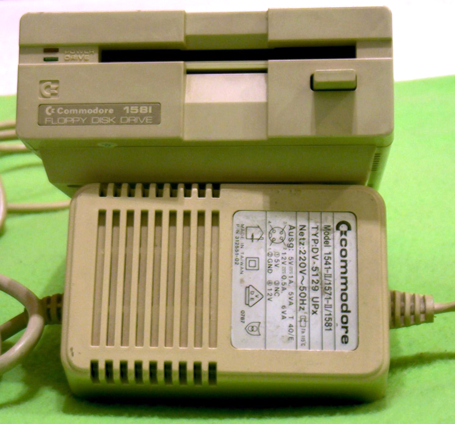 Unidad de disco externa Commodore 1581